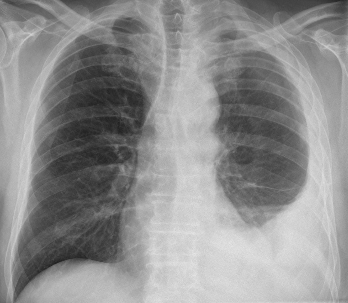 Pleuramesotheliom im Röntgenbild des Thorax: Pleuraverdickung und -erguß links (rechts im Bild).